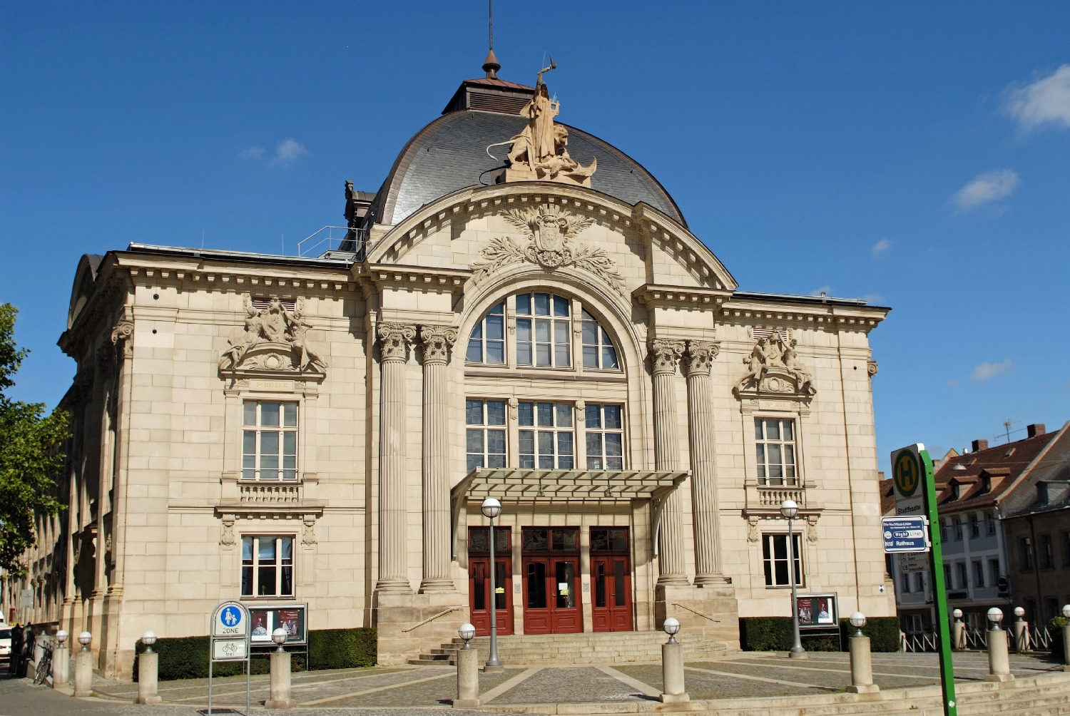 Fürth, Bavaria, Germany